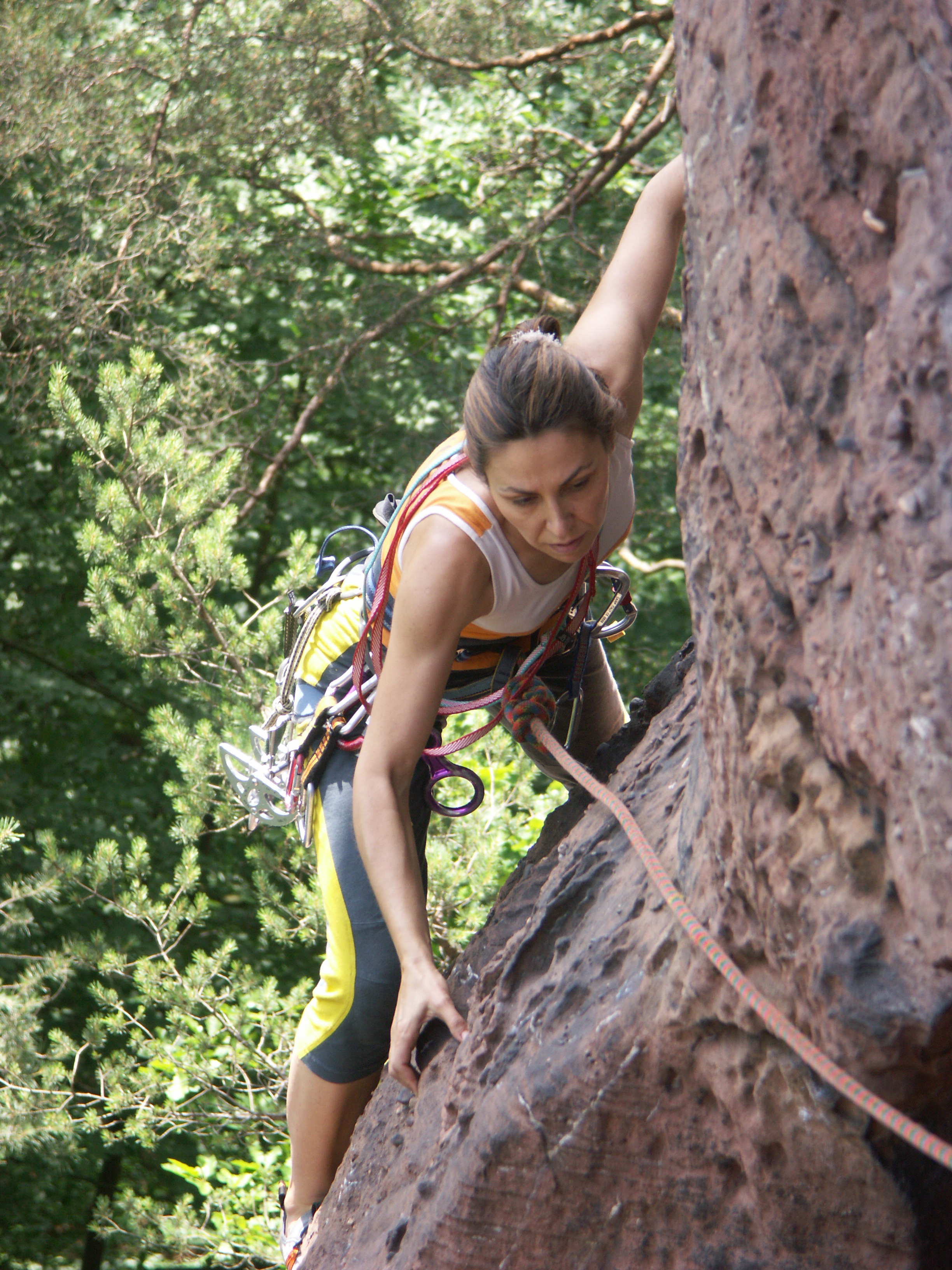 In der Schlüsselstelle der Kumbtverschneidung. Deutschland, Rheinland-Pfalz, Südpfalz, Kumbtfels bei Erfweiler